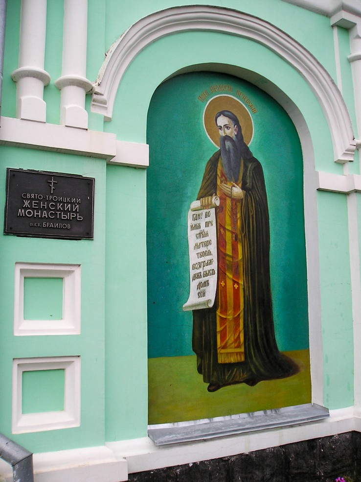 Ворота Троїцького монастиря, Жмеринський район, смт Браїлів, Вул. Леніна,1